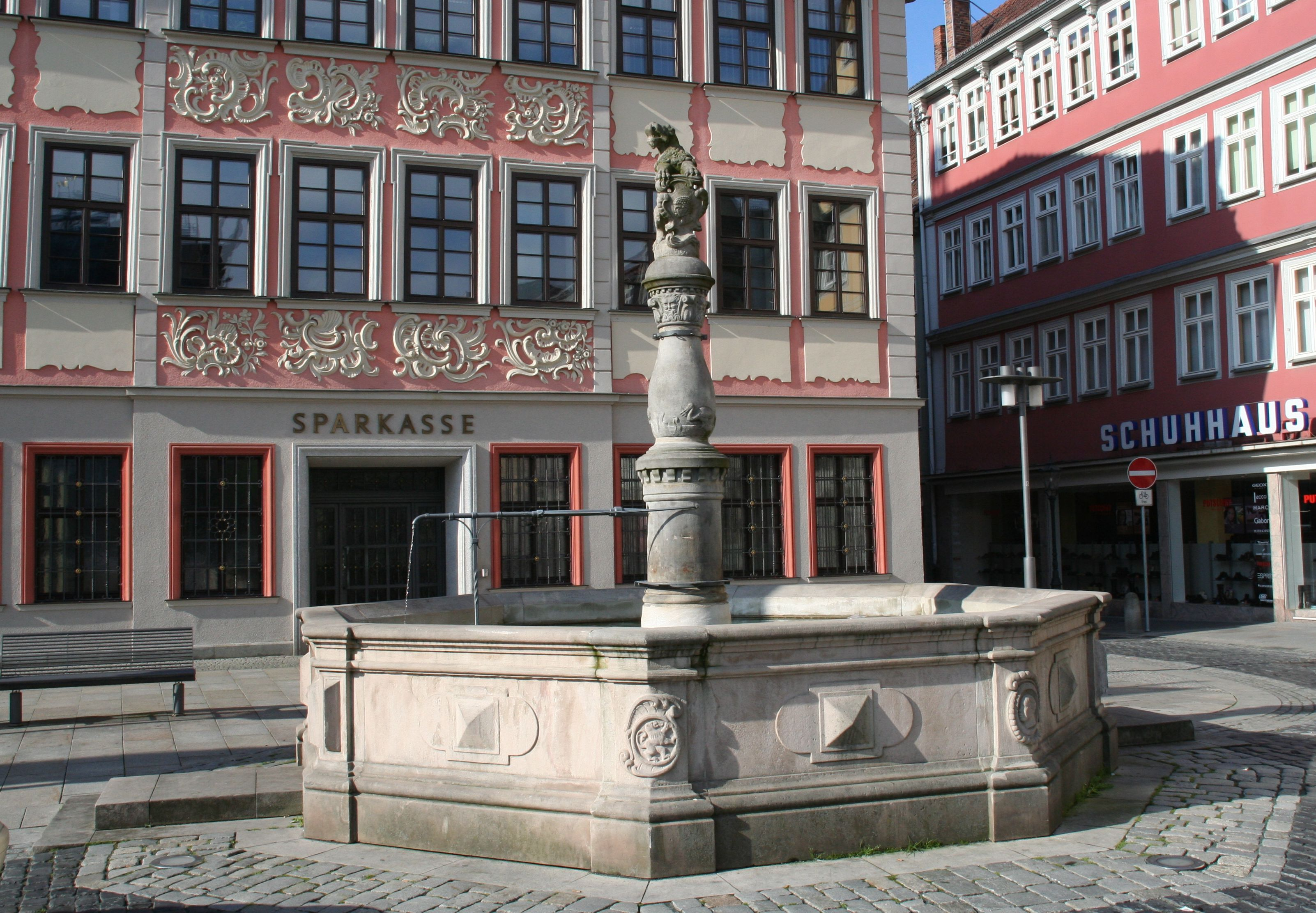 Marktplatz in Coburg, Brunnen vor der Rosengasse